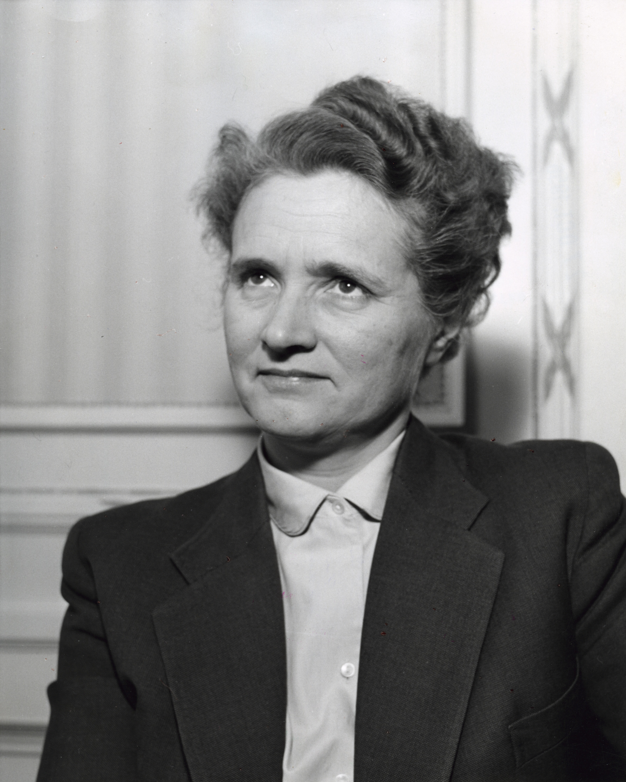 Marga Klompé (1912-1986), KVP-politica en Nederlands eerste vrouwelijke minister. Nederland, 22 februari 1956.